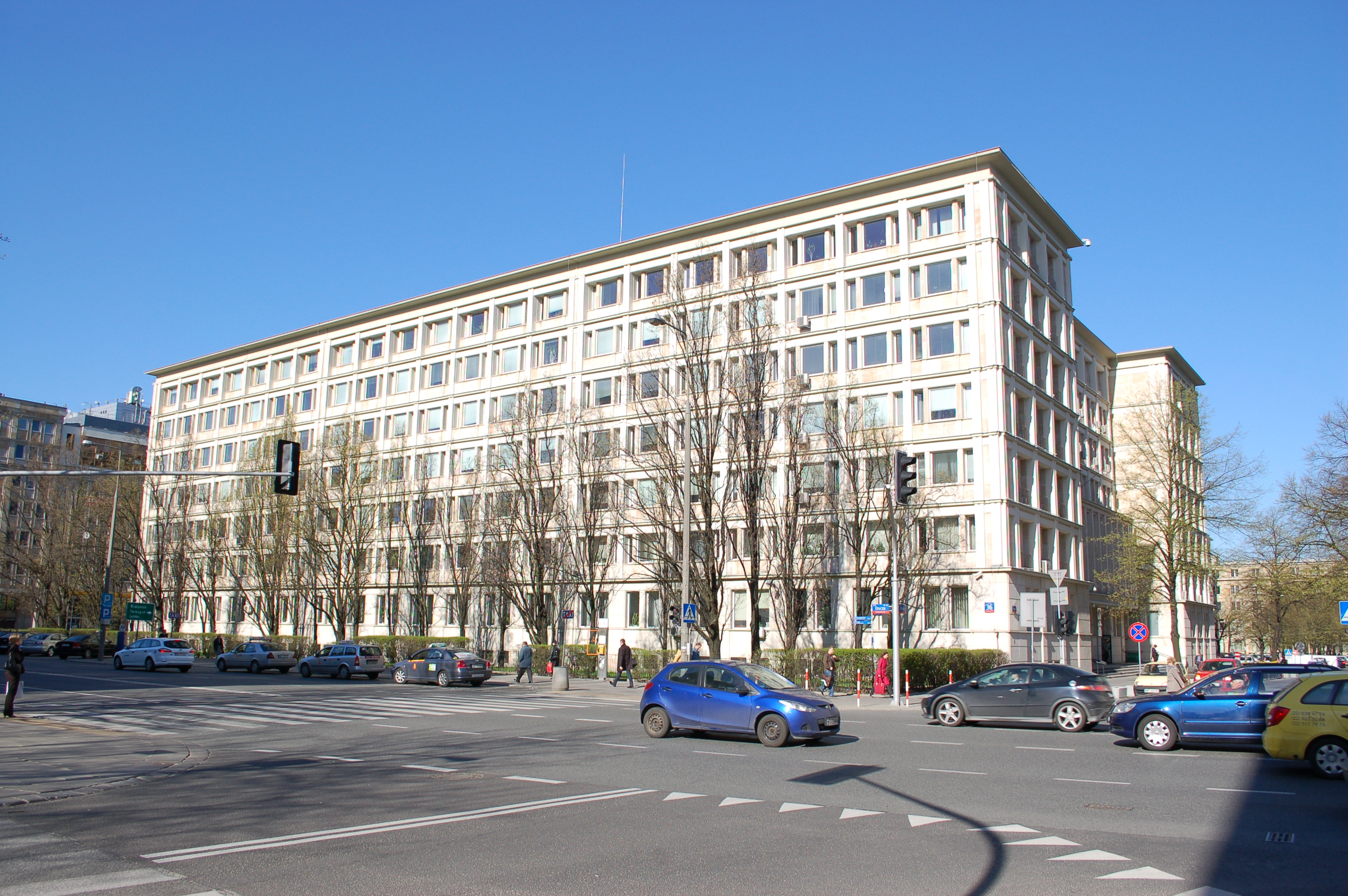 Skarb Panstwa, Schatzministerium Warschau